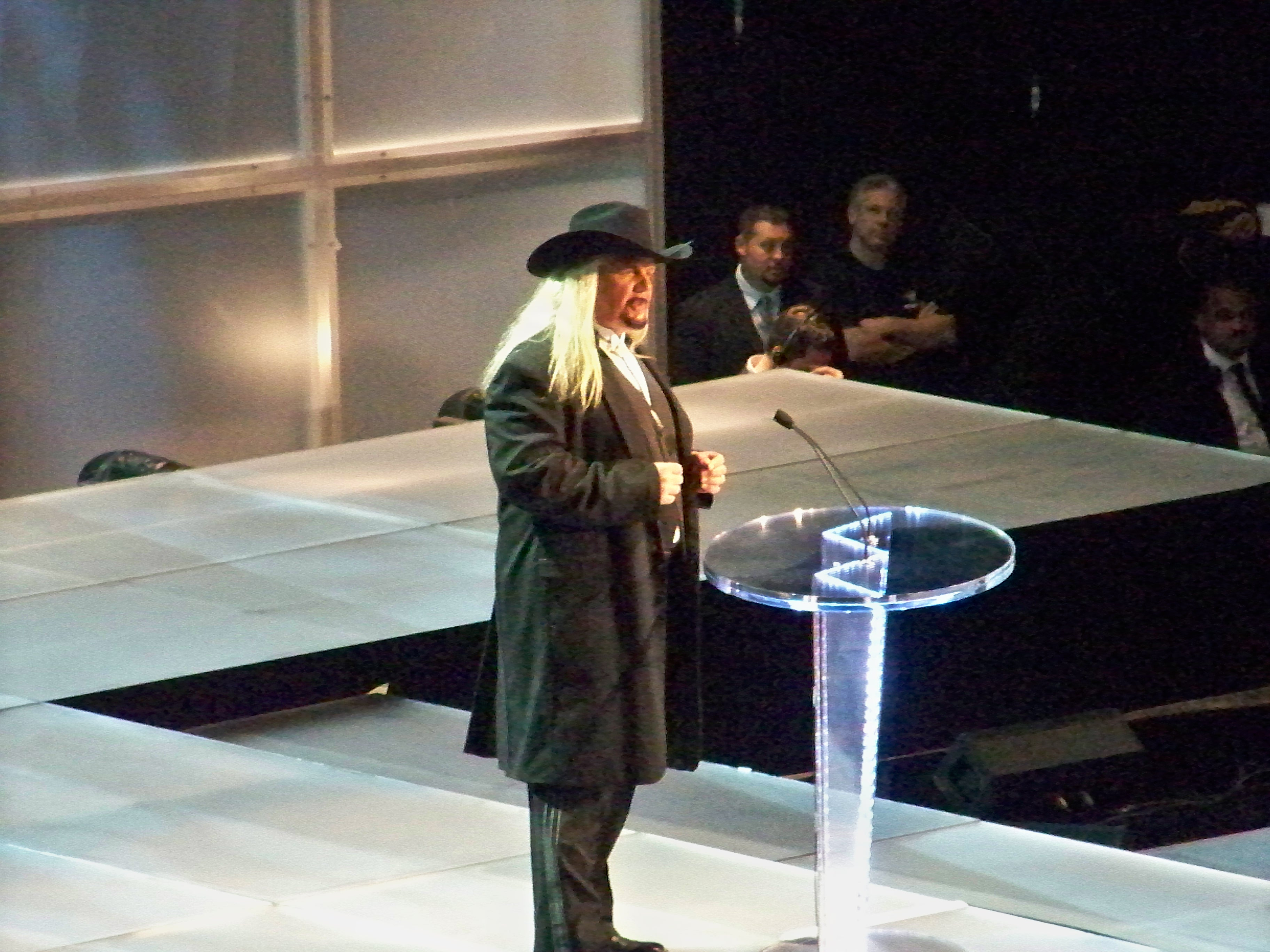 Toujours aussi bien habiller